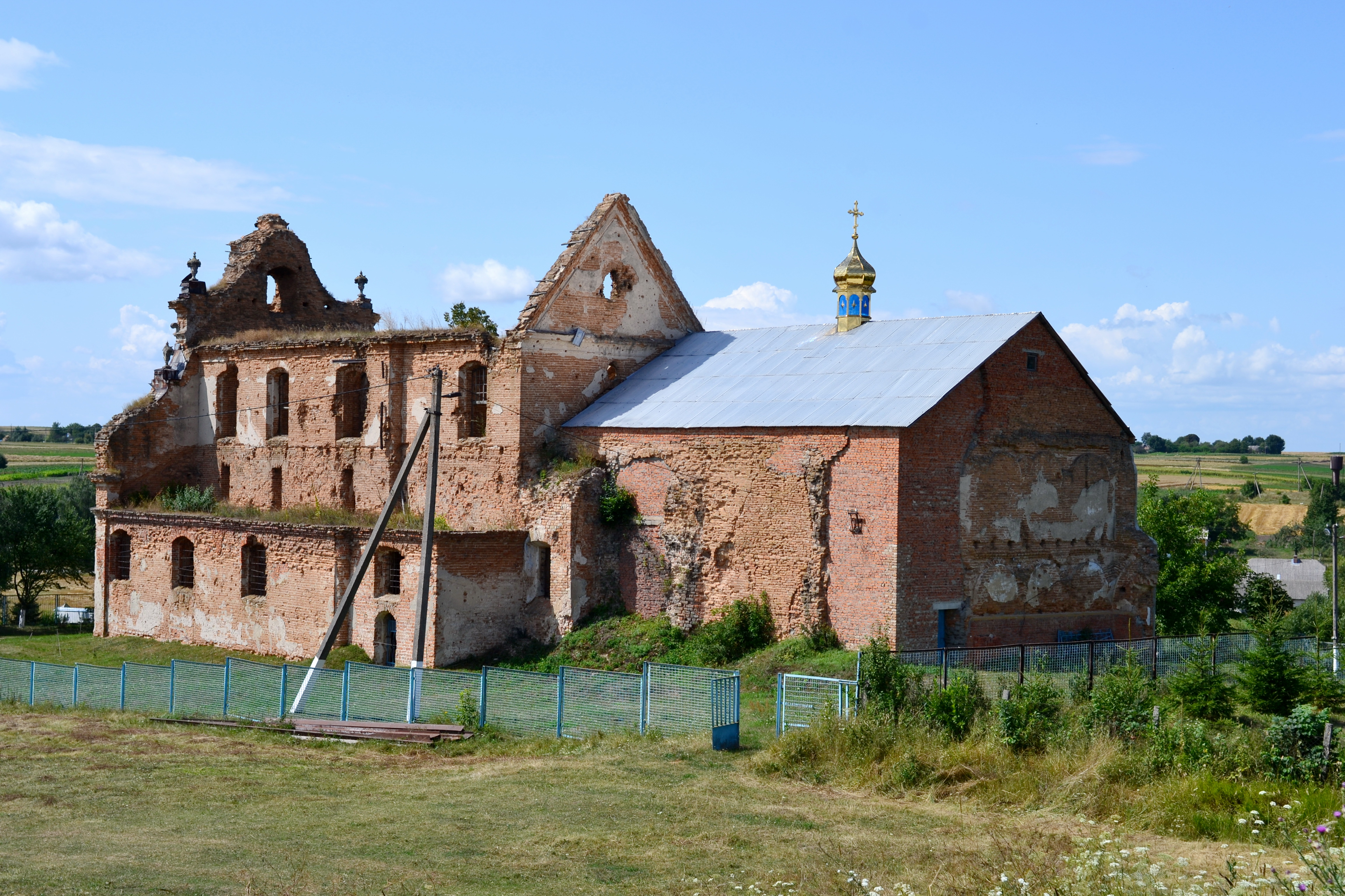 Загорівський монастир (1566 рік) - вигляд з південного сходу - Новий Загорів (на південній околиці села) Локачинський район Волинська область Україна